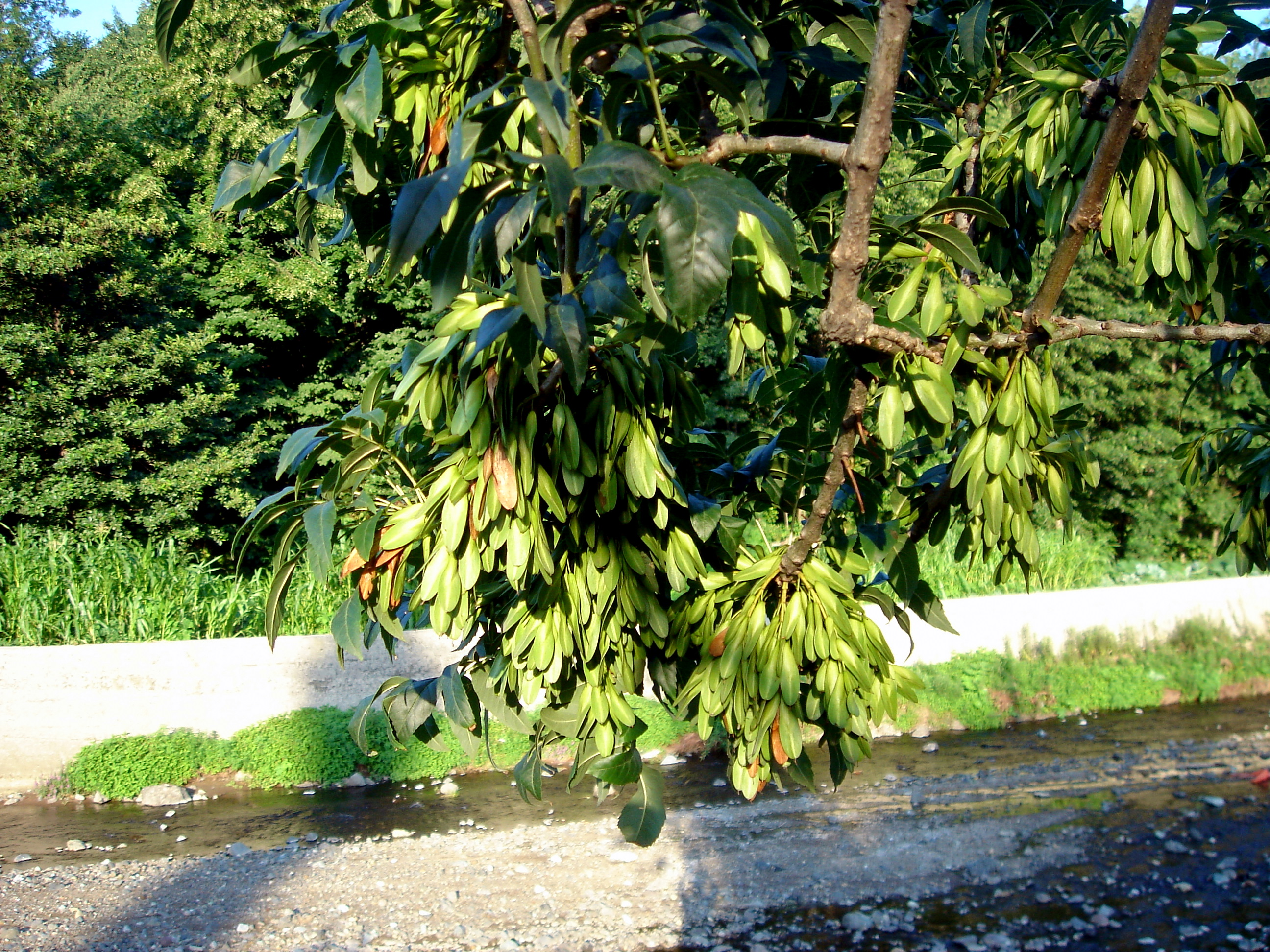 Kafkas dişbudağı (Fraxinus angustifolia subsp. oxycarpa)